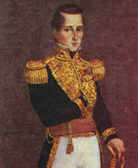 Retrato de José María Córdova, por Jose María Espinoza Prieto (1793-1883)